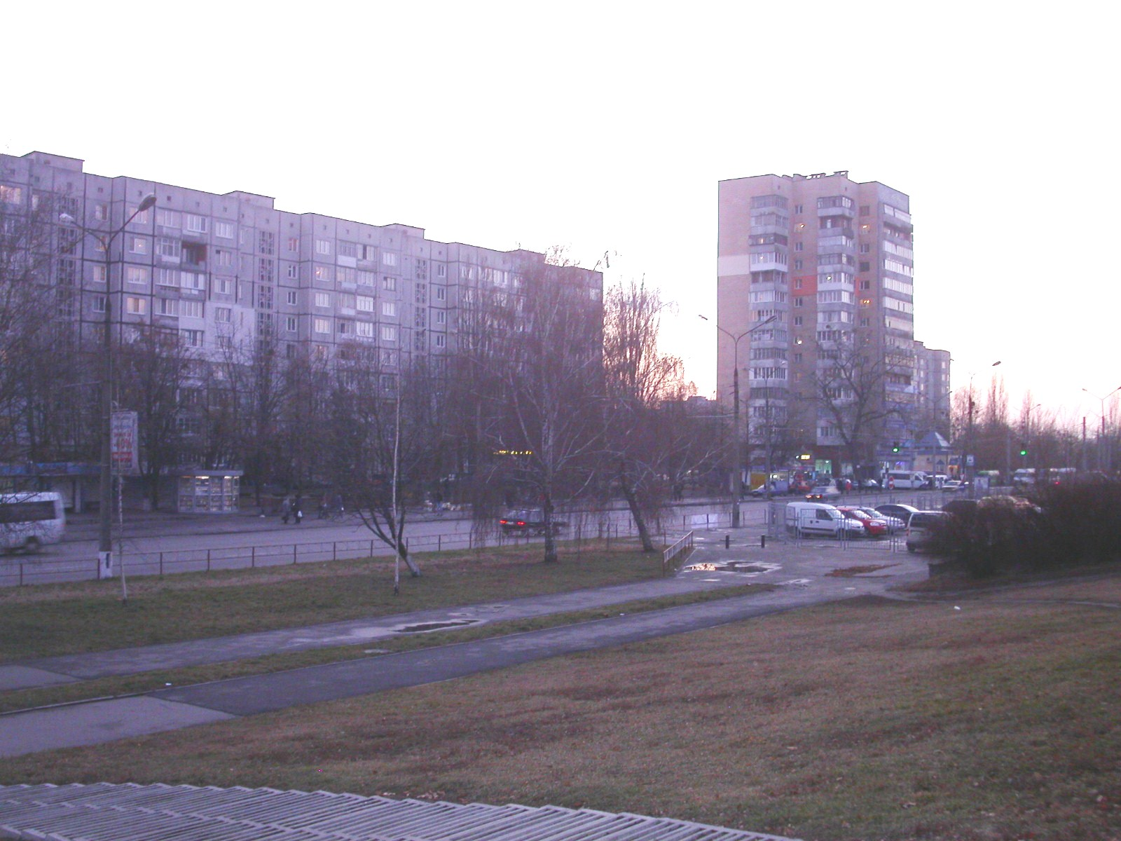 Вулиця Леваневського у Білій Церкві